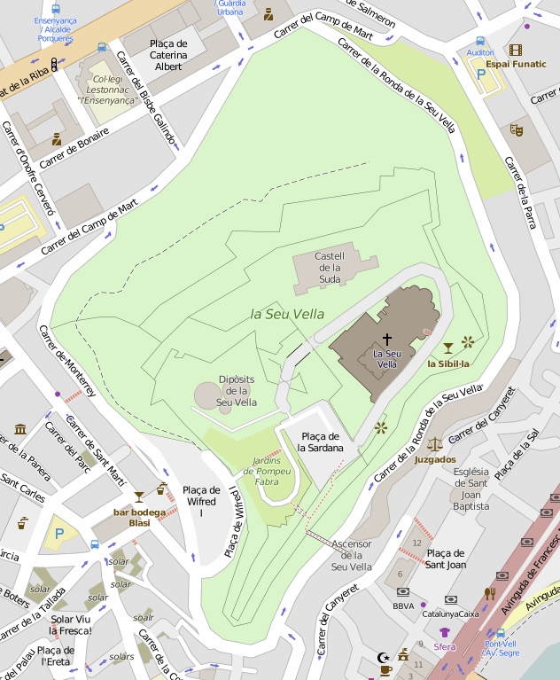 Lleida (Katalonien, Spanien), Kirchhügel mit Alter Kathedrale, Burg und Festung. Bildschirmfoto aus OpenStreetMap.